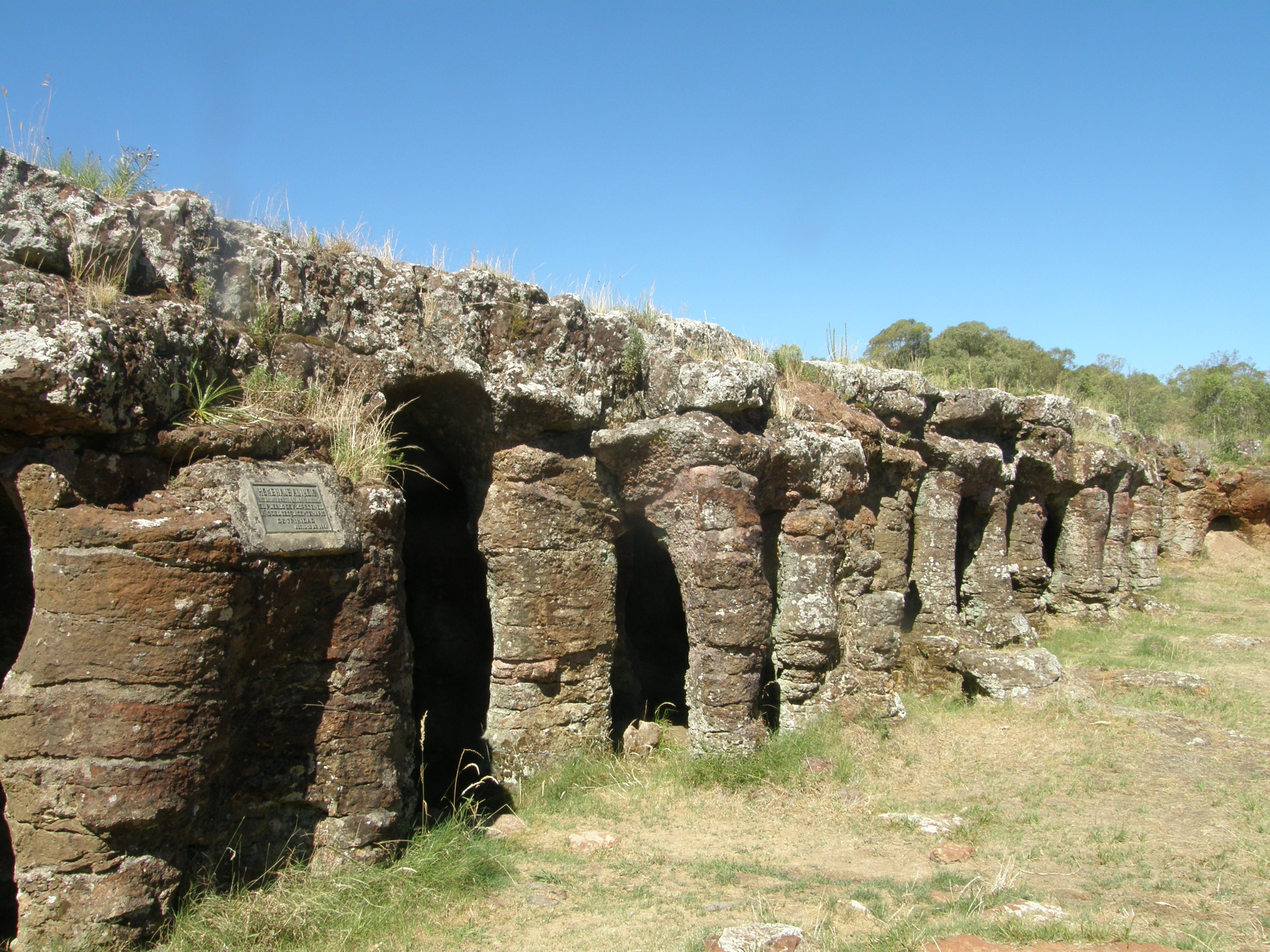 caverna formada por la erosión de areniscas surgentes que dio lugar a columnas polimórficas solidificadas con óxido de hierro: 23 metros de frente por 3 metros de alto